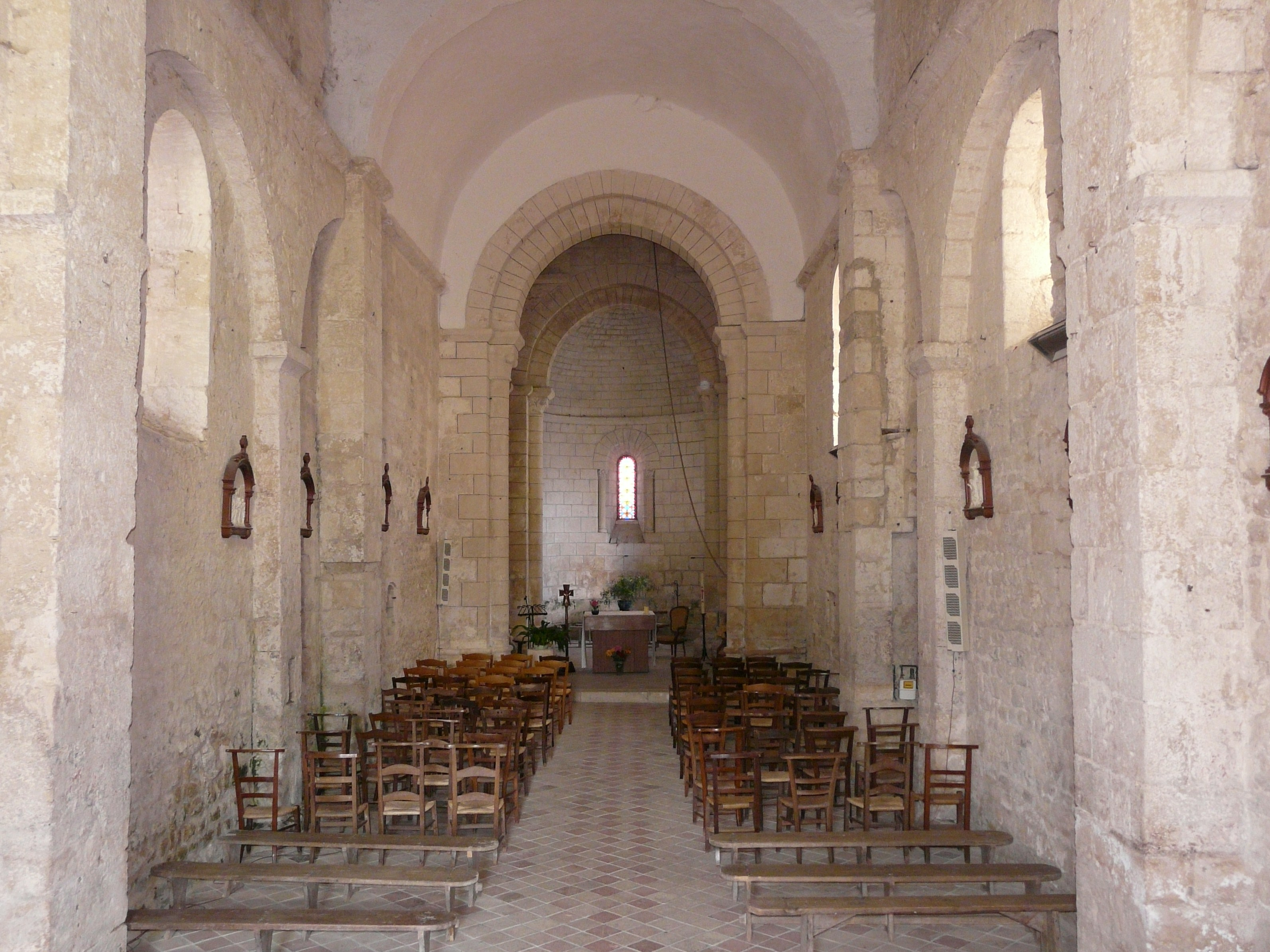 La nef de l'église Saint-Christophe de Vindelle, Charente, France.